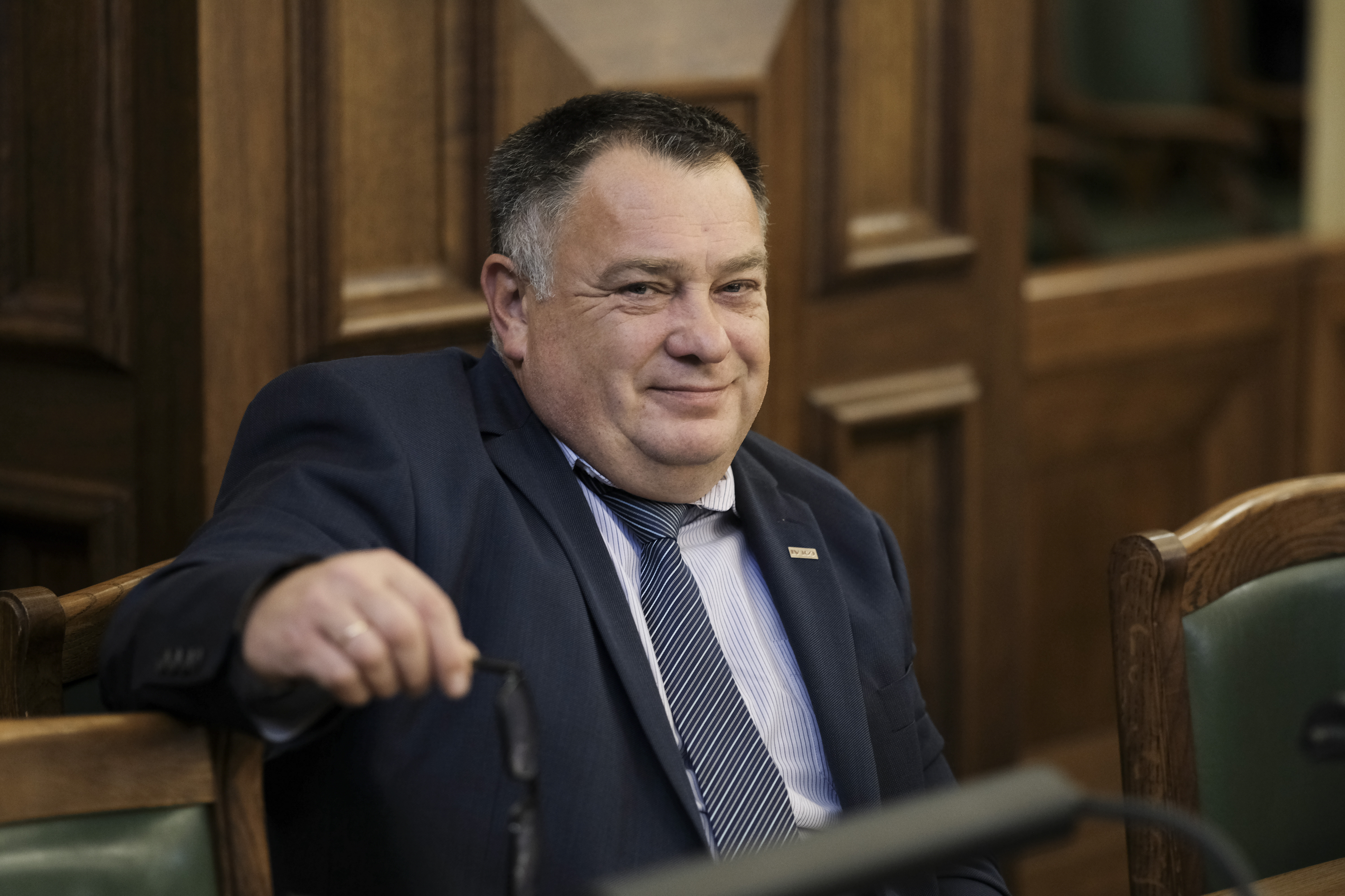 2017.gada 5.oktobris. Darbs Saeimas sēdē. Foto: Reinis Inkēns, Saeimas Administrācija Izmantošanas noteikumi: saeima.lv/lv/autortiesibas